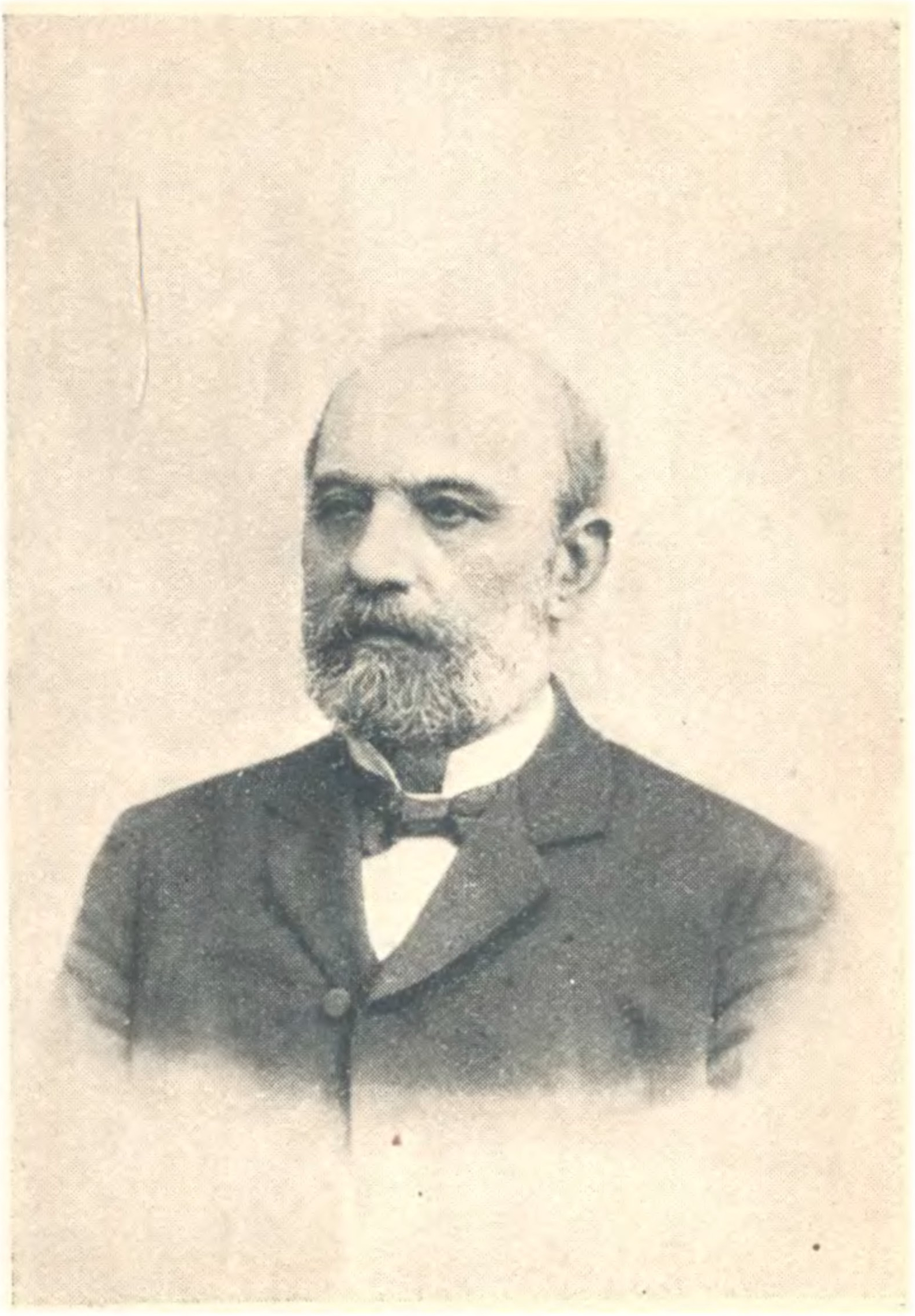 Фотографія Ореста Левиьцкого з 60-х років життя